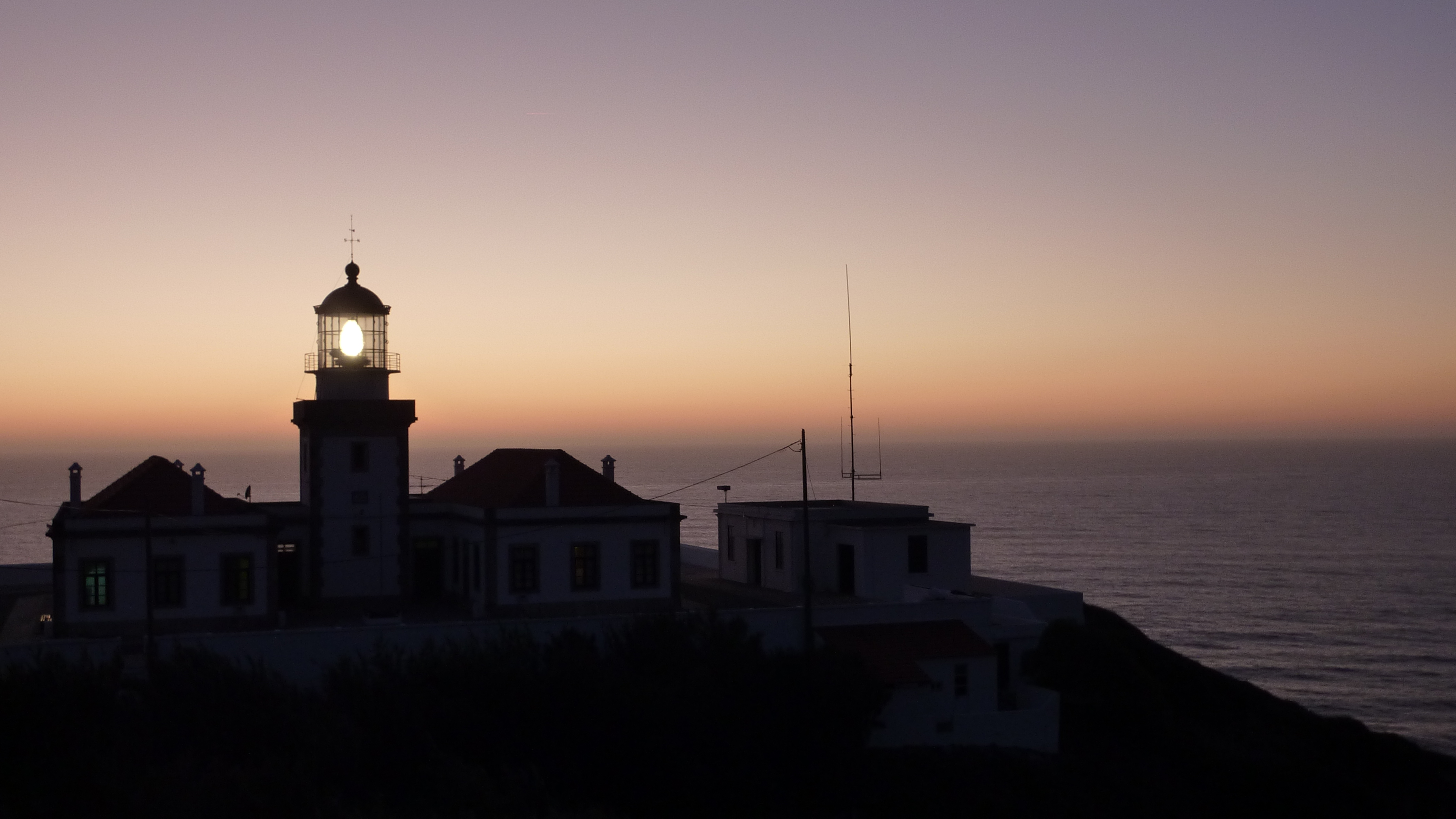 Faro do Cabo Mondego, Buarcos, Figueira da Foz. This file was uploaded for Wiki Loves Monuments in Portugal with the unique identifier 3754161. This monument is classified as IIM - Imóvel de Interesse Municipal.